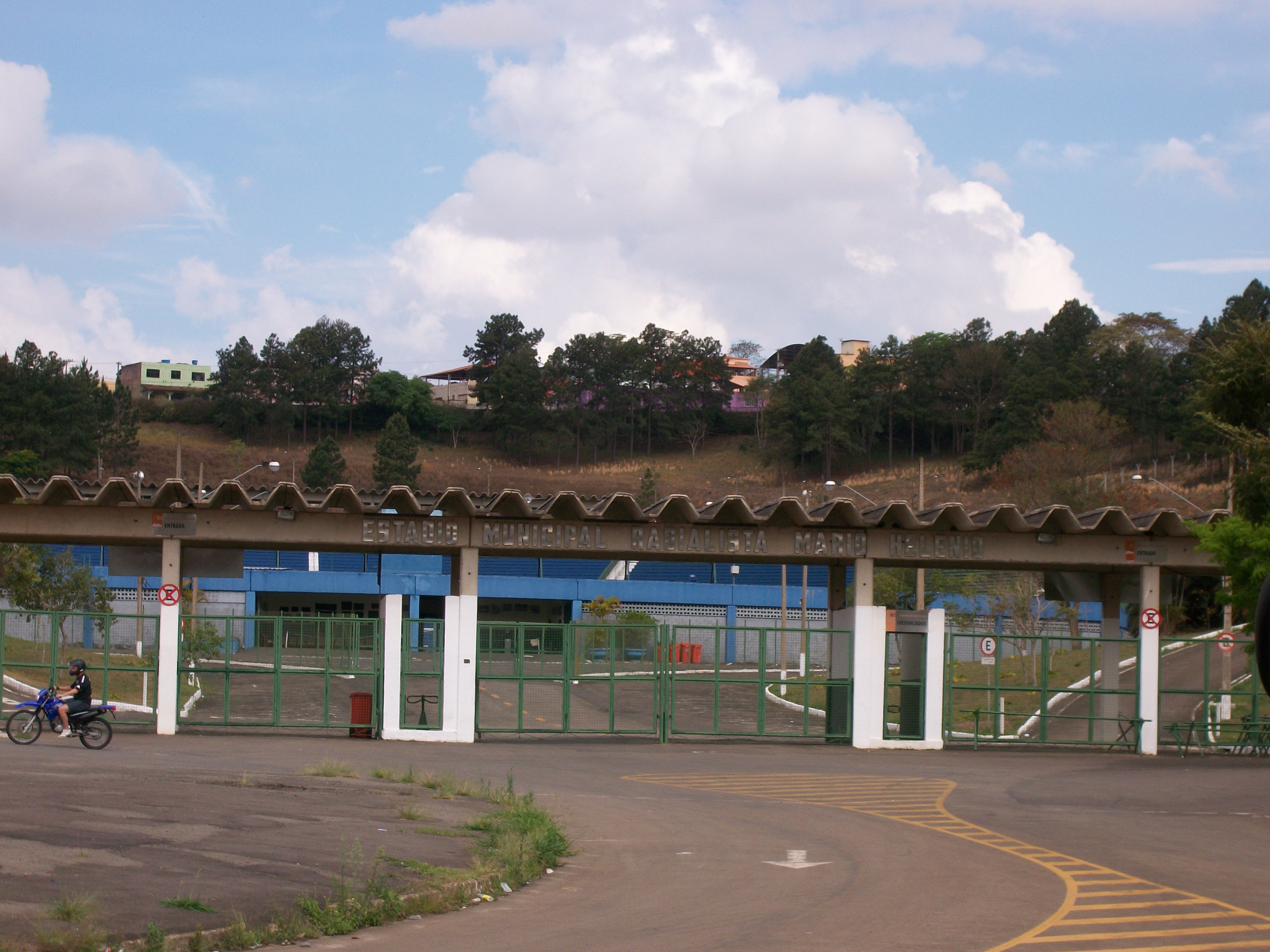 Entrada do Estádio Municipal Radialista Mário Helênio, em Juiz de Fora.